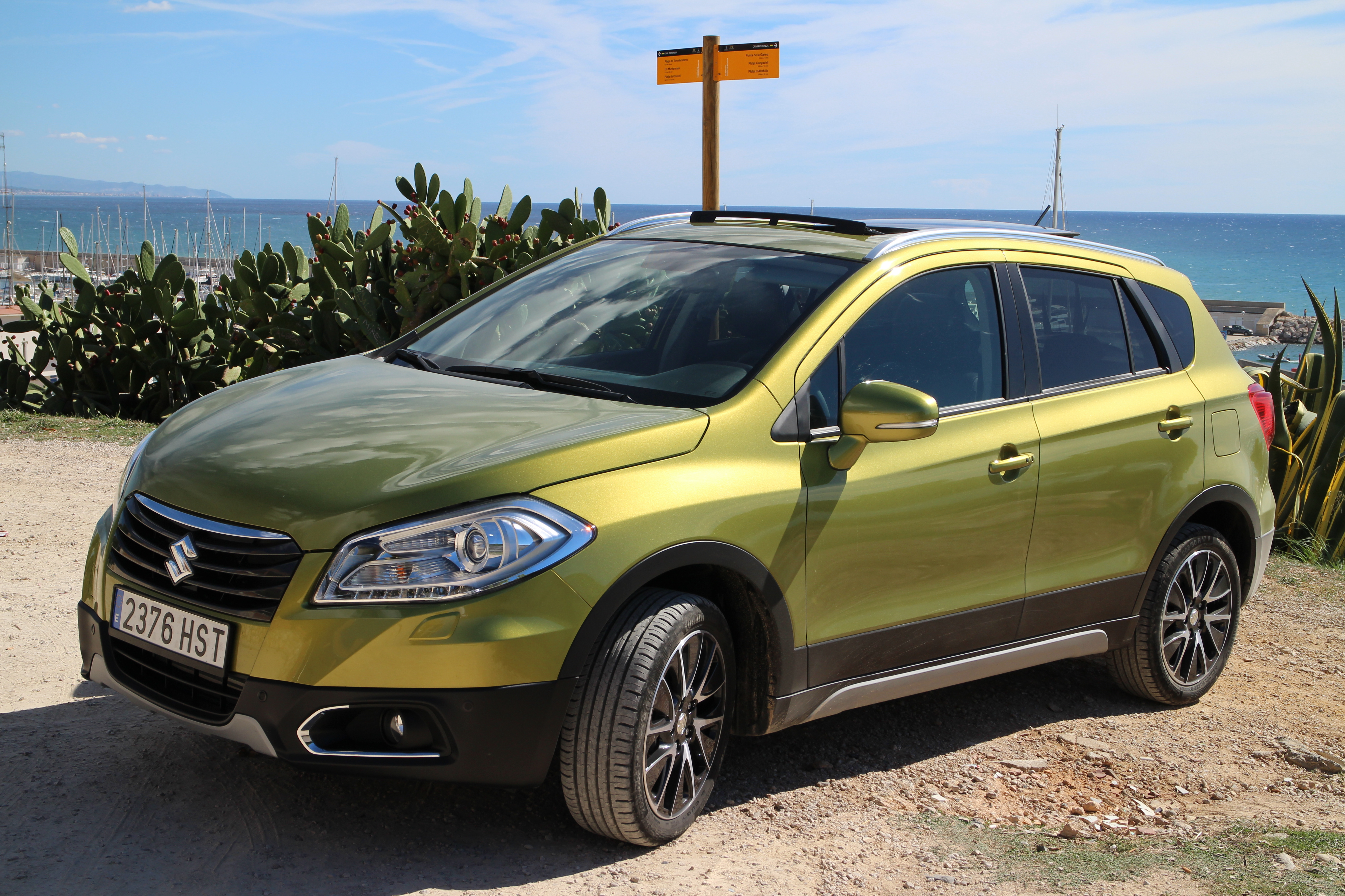 Suzuki SX4 S-Cross